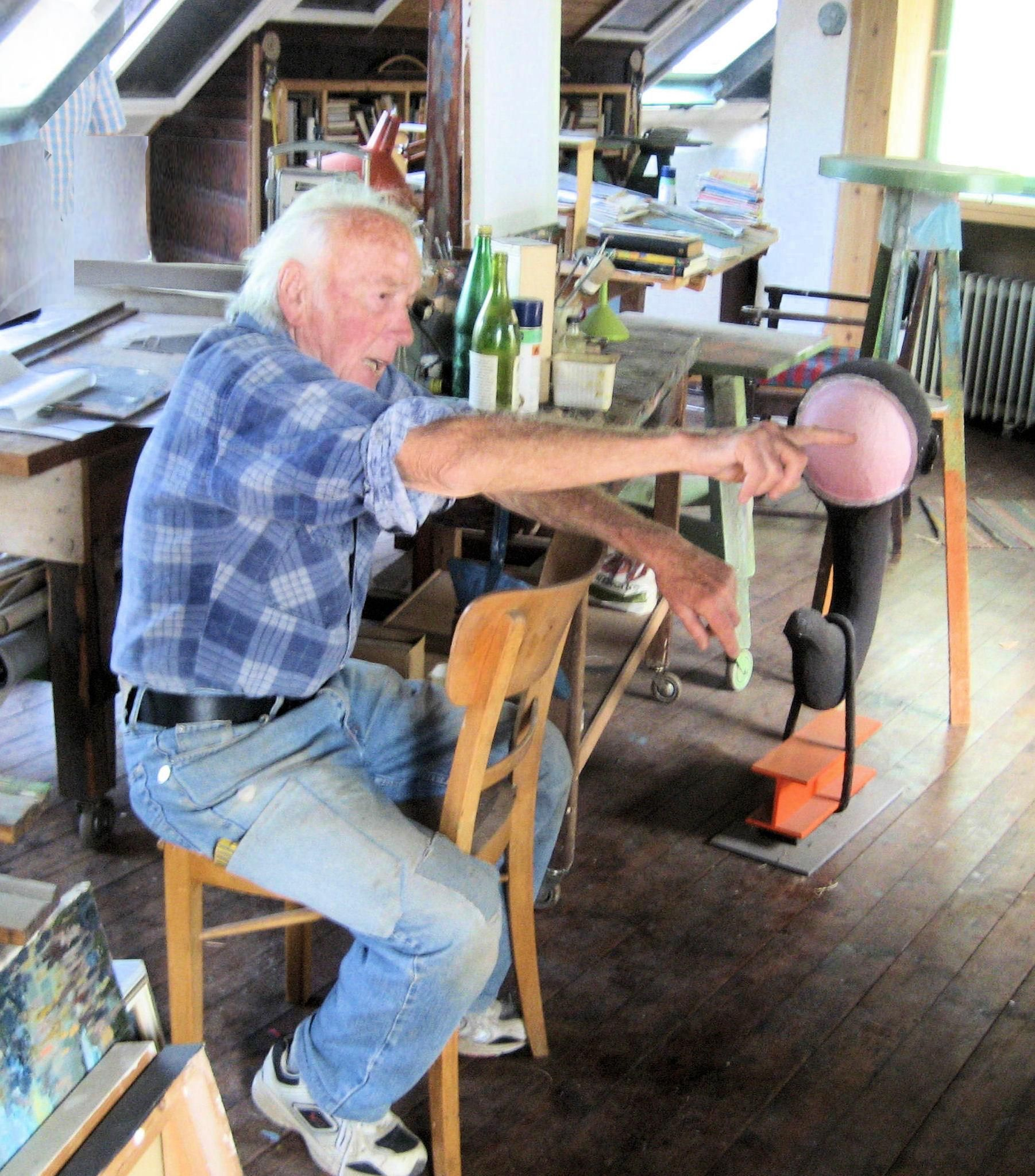 In seinem Atelier